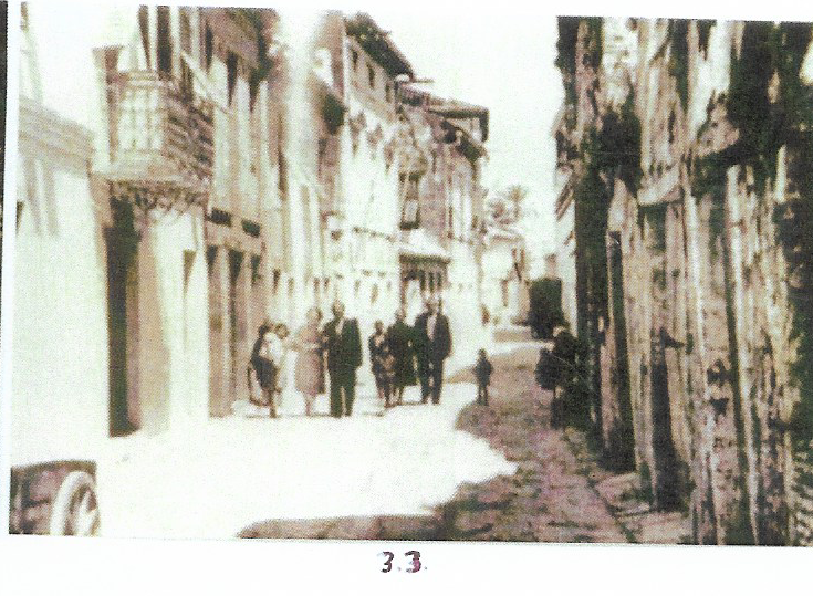 רחוב ברובע היהודי בזקינטוס